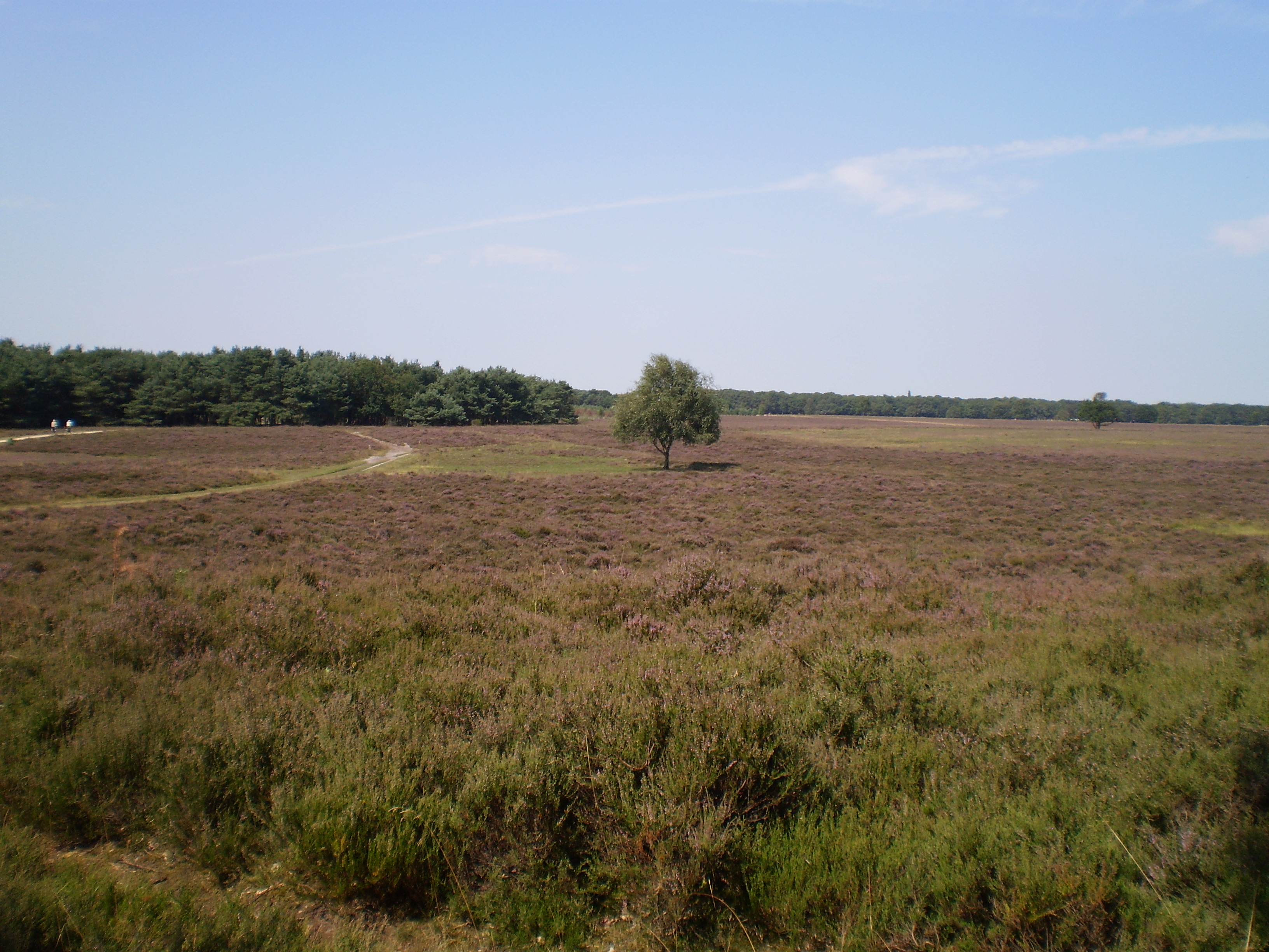 Bussumerheide rjochting Bussum